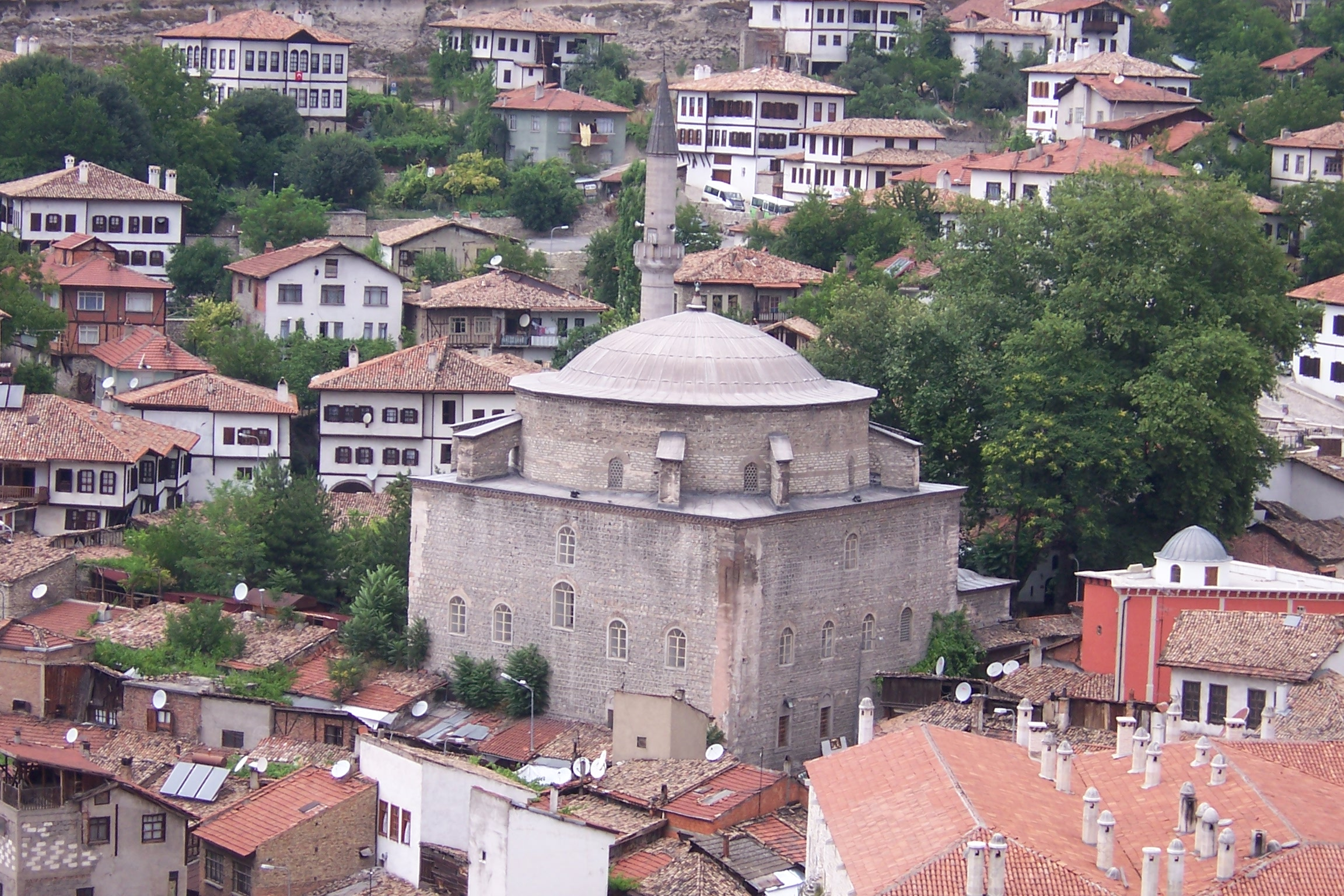 Köprülü Mehmet Paşa Camii, Safranbolu, Karabük, Turkey